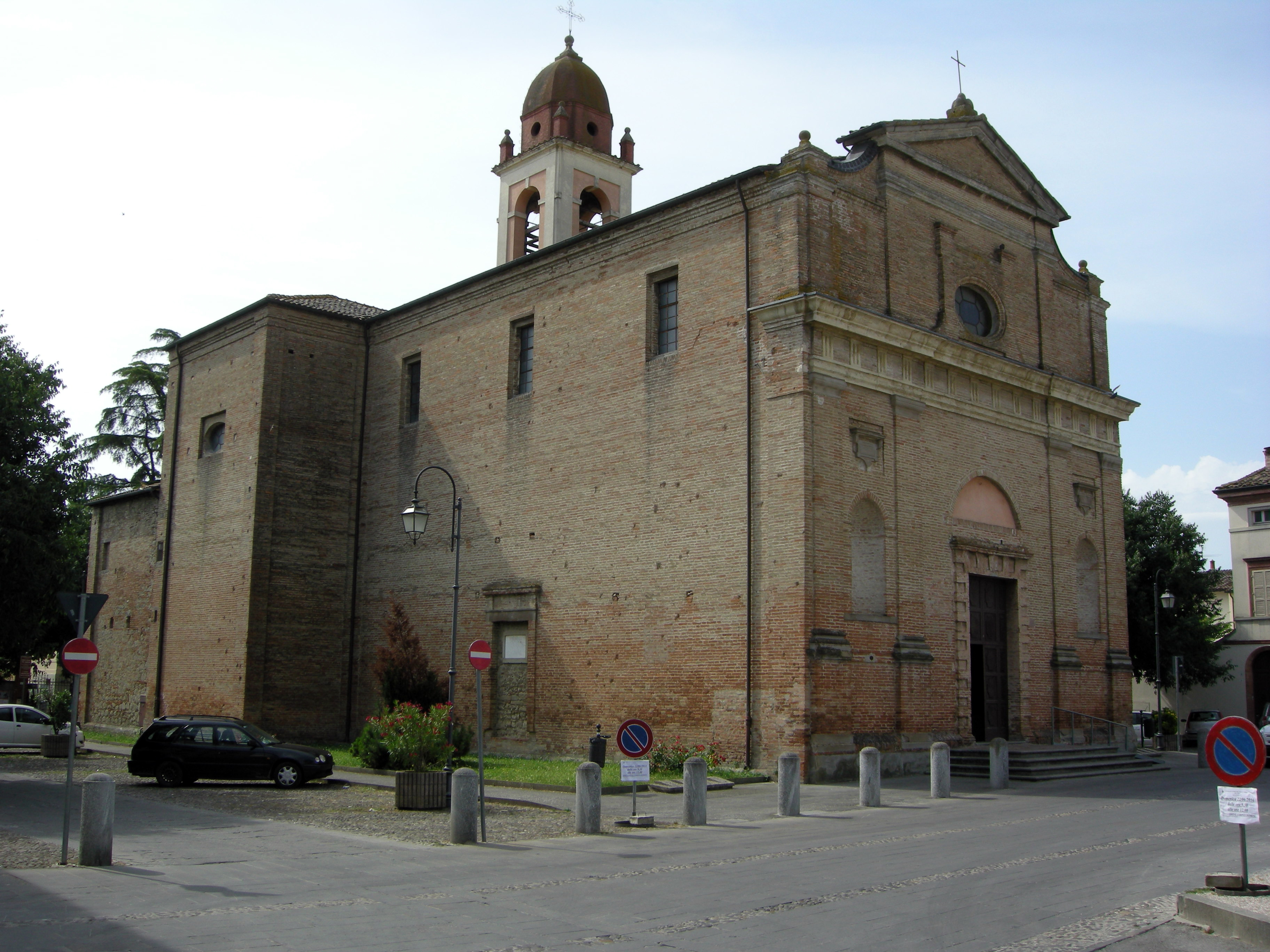 Santa Reparata (Terra del Sole)